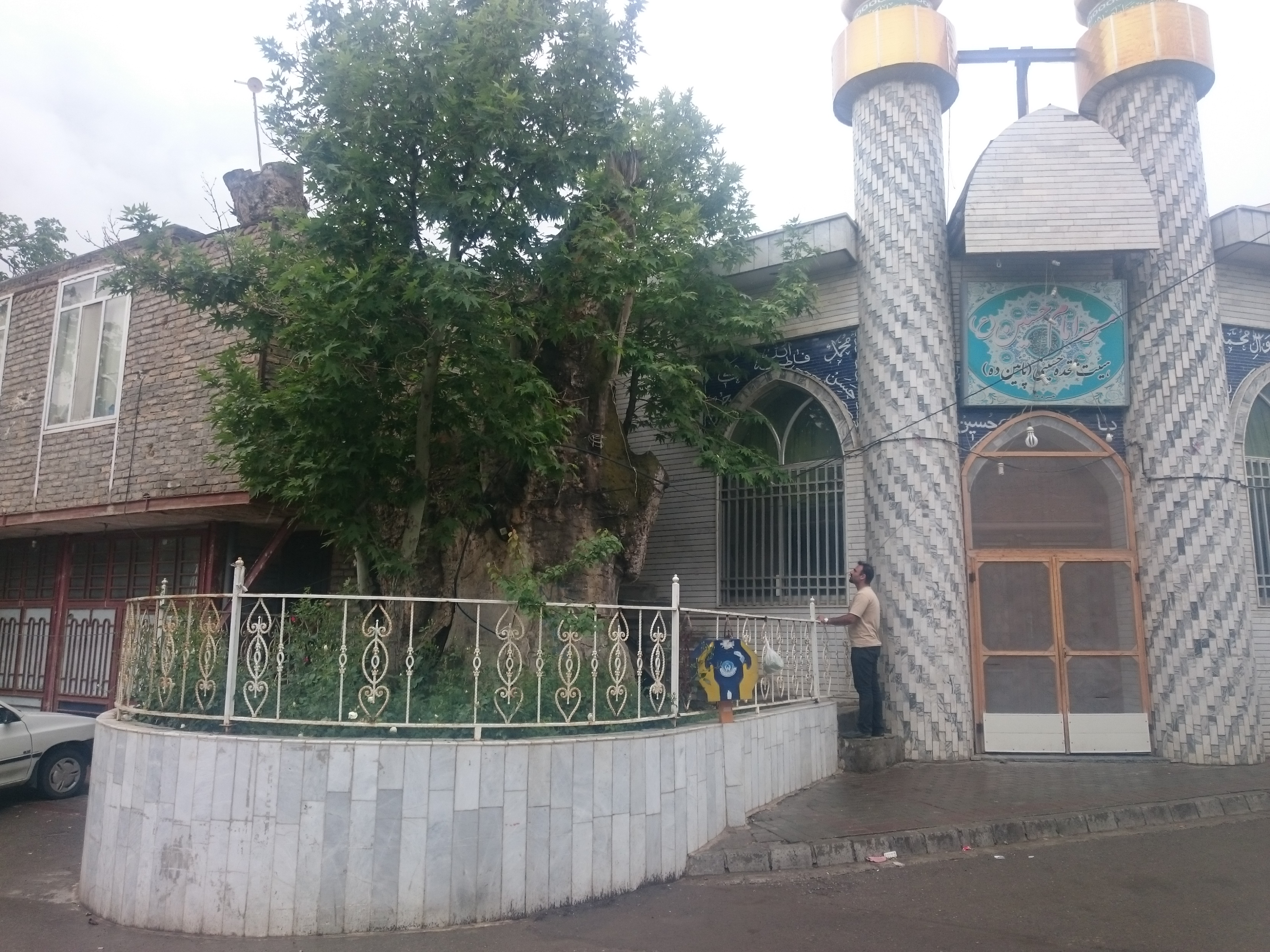 چنار کهنسال کوچۀ نسترن شاندیز